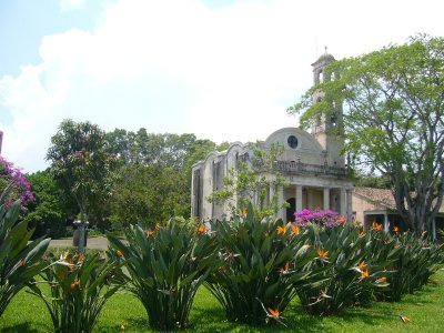 Hacienda e iglesia de El Lencero, Emiliano Zapata, Veracruz, Mèxico. En esta iglesia se casó el general Santa Anna con Doña Dolores Tosta en 1844.)